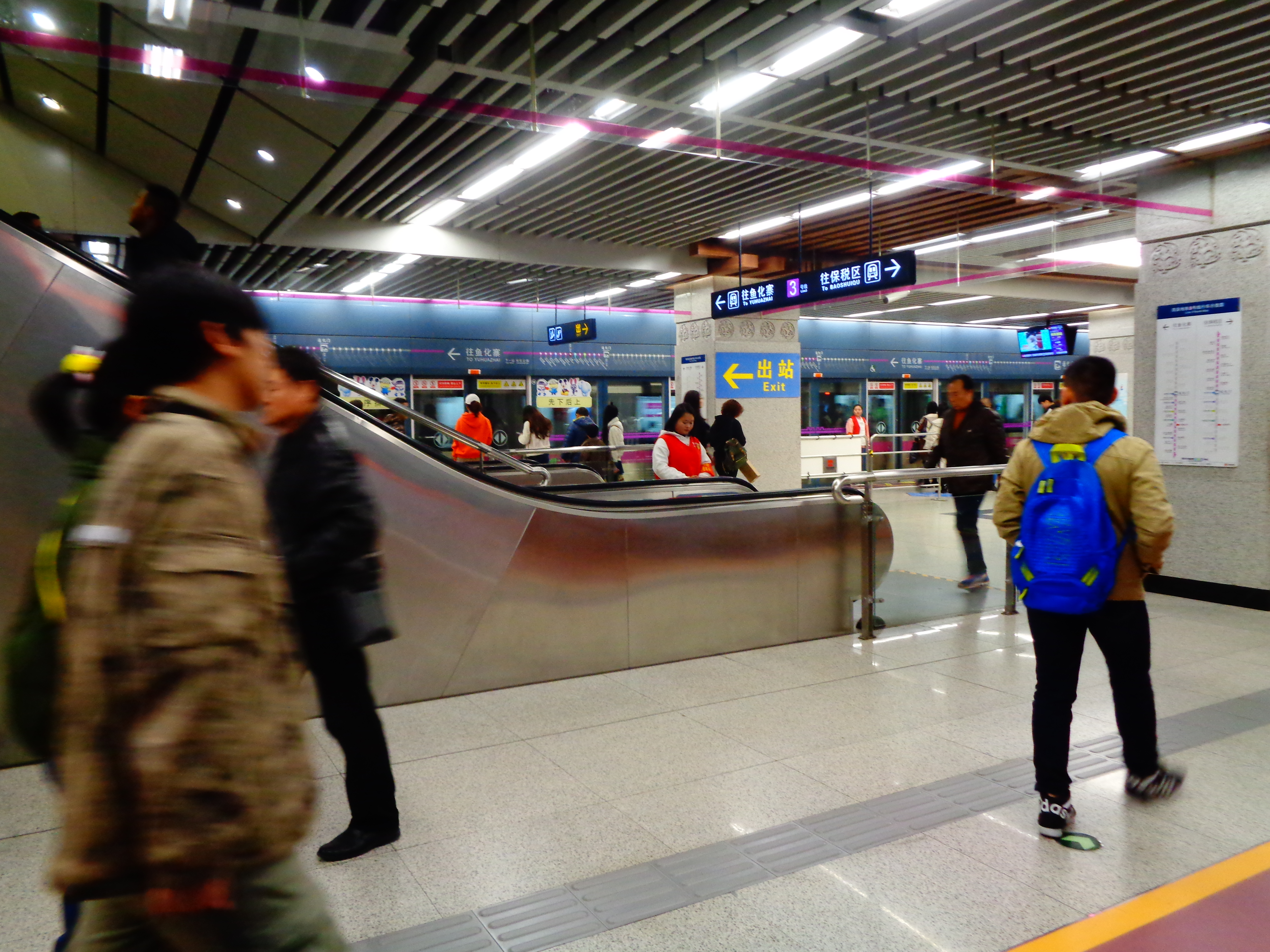 西安市区地铁三号线